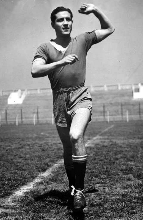 El máximo goleador de Independiente, el paraguayo Arsenio Erico.